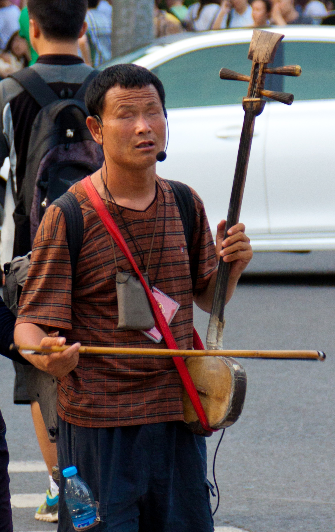 Blinda viro ludas lejĉino.